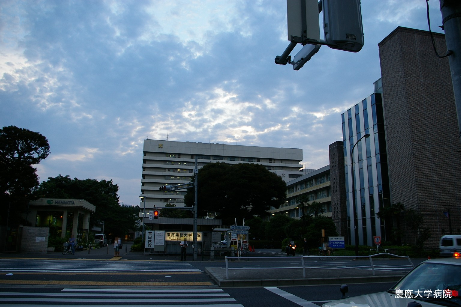 2009.5日本国内で塾生 (talk)が撮影。